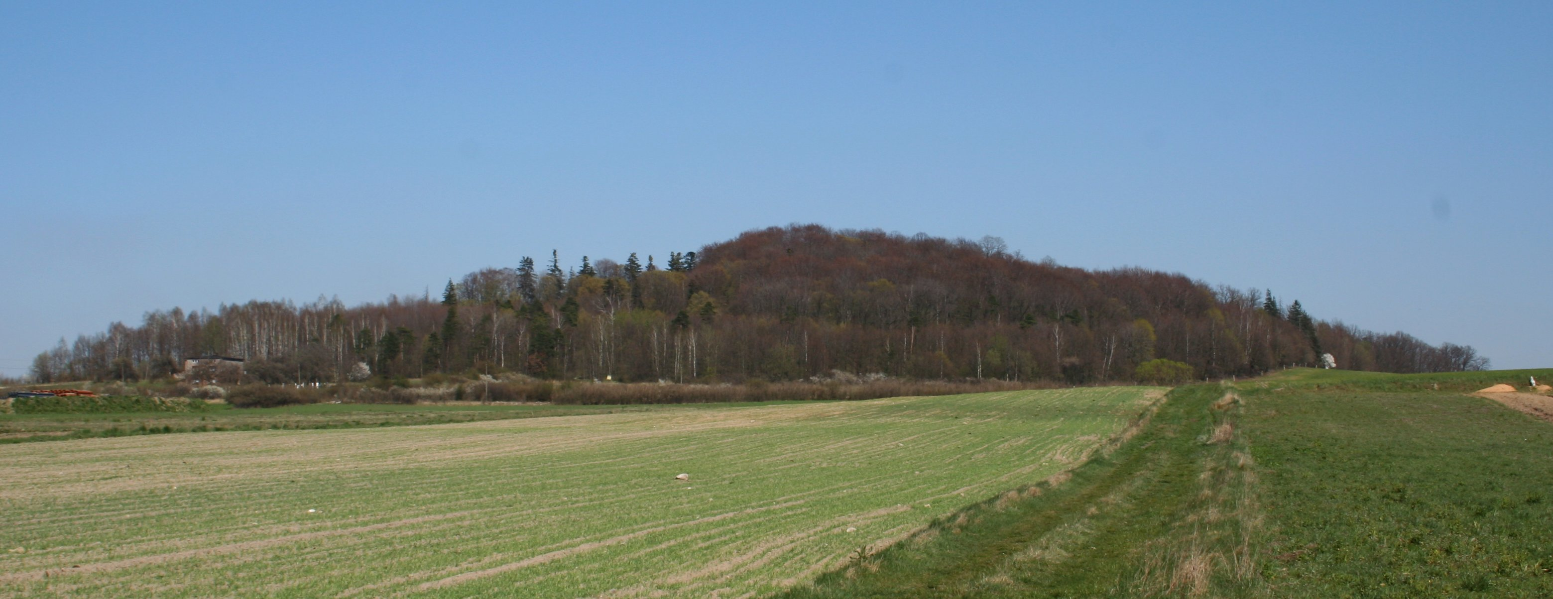 Góra Grojec, gmina Woźniki, powiat lubliniecki, województwo śląskie